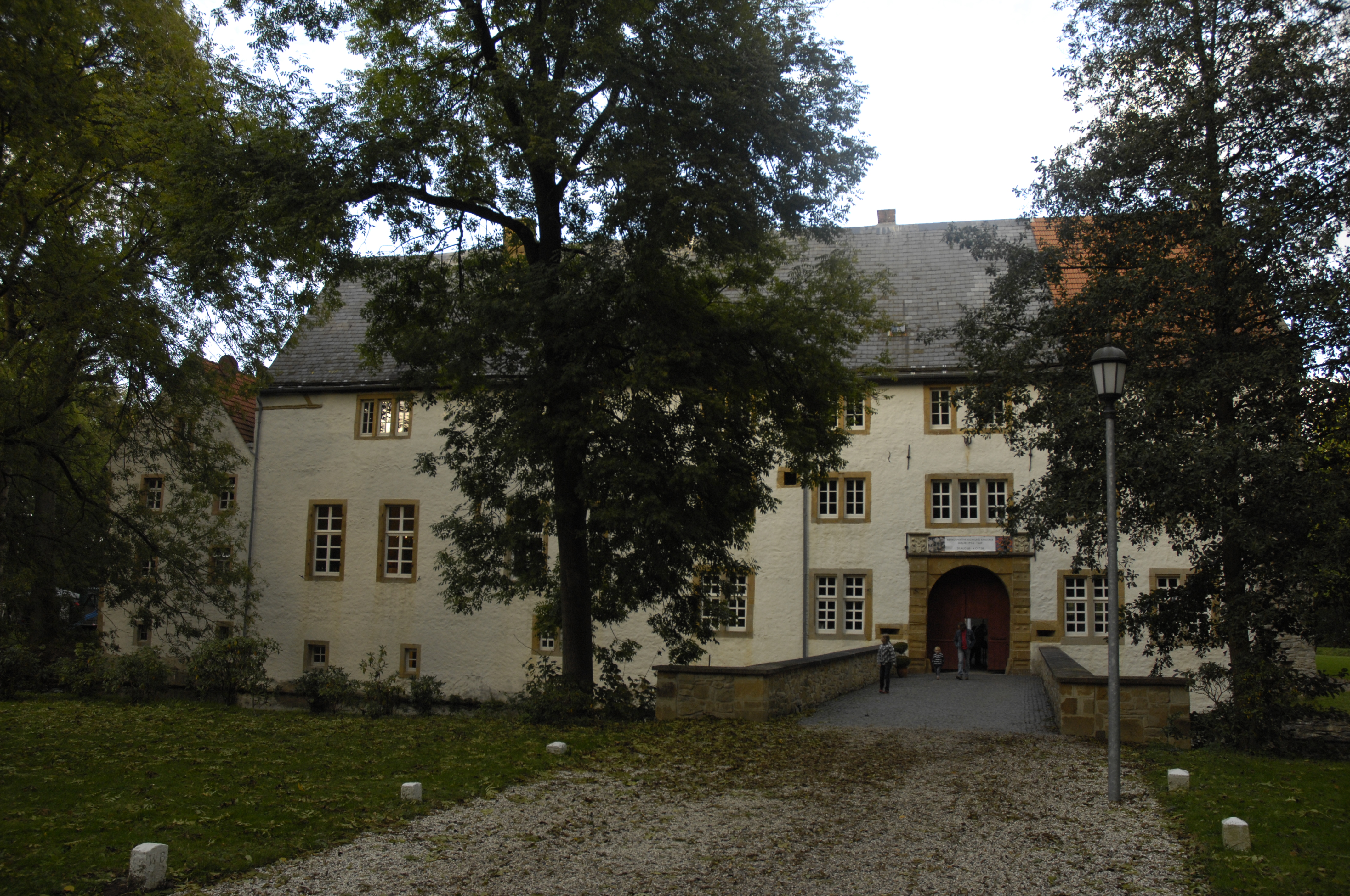 Haus Königsbrück in Melle-Neuenkirchen an der Warmenau